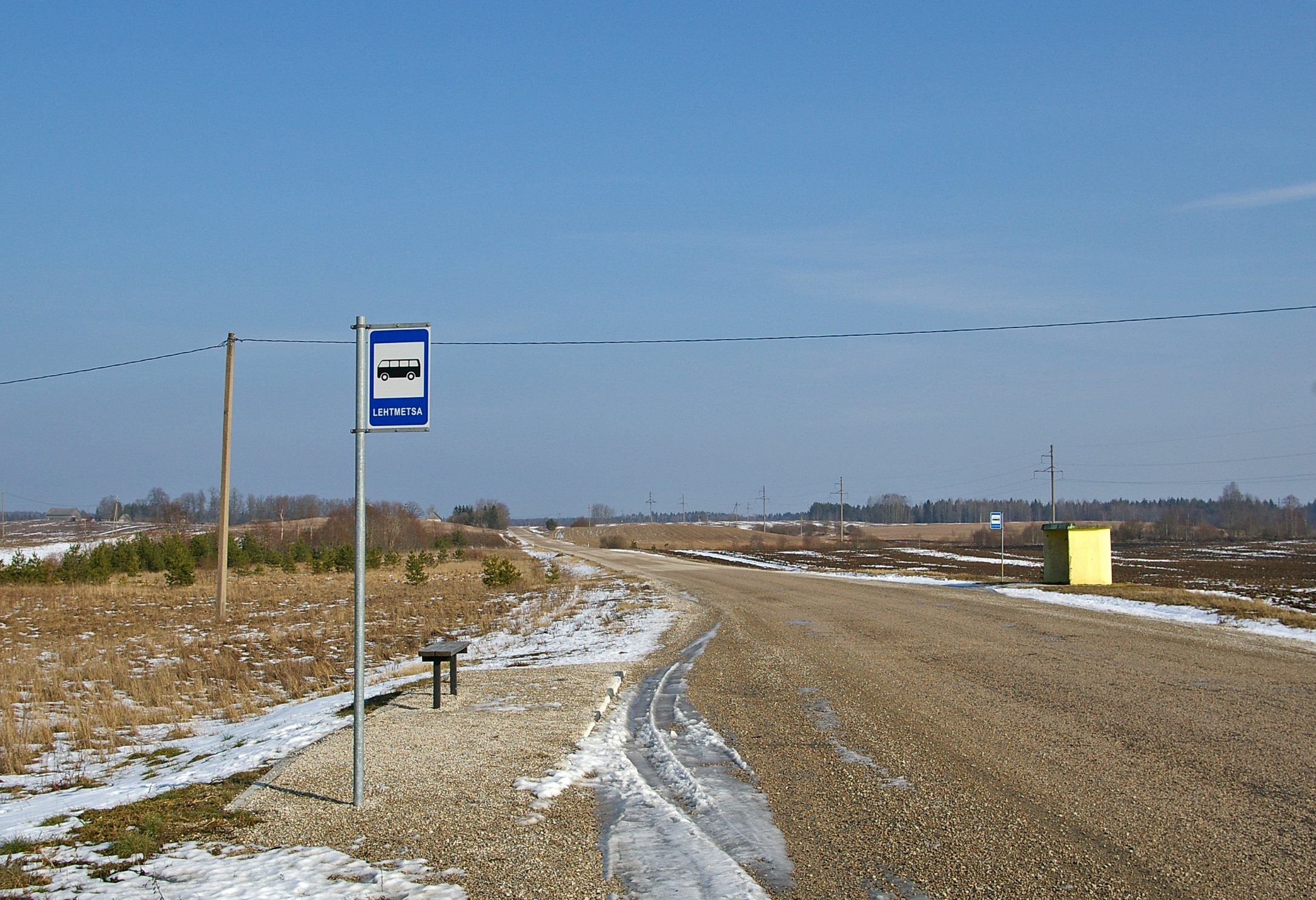 Lehtmetsa küla Albu vallas Järvamaal